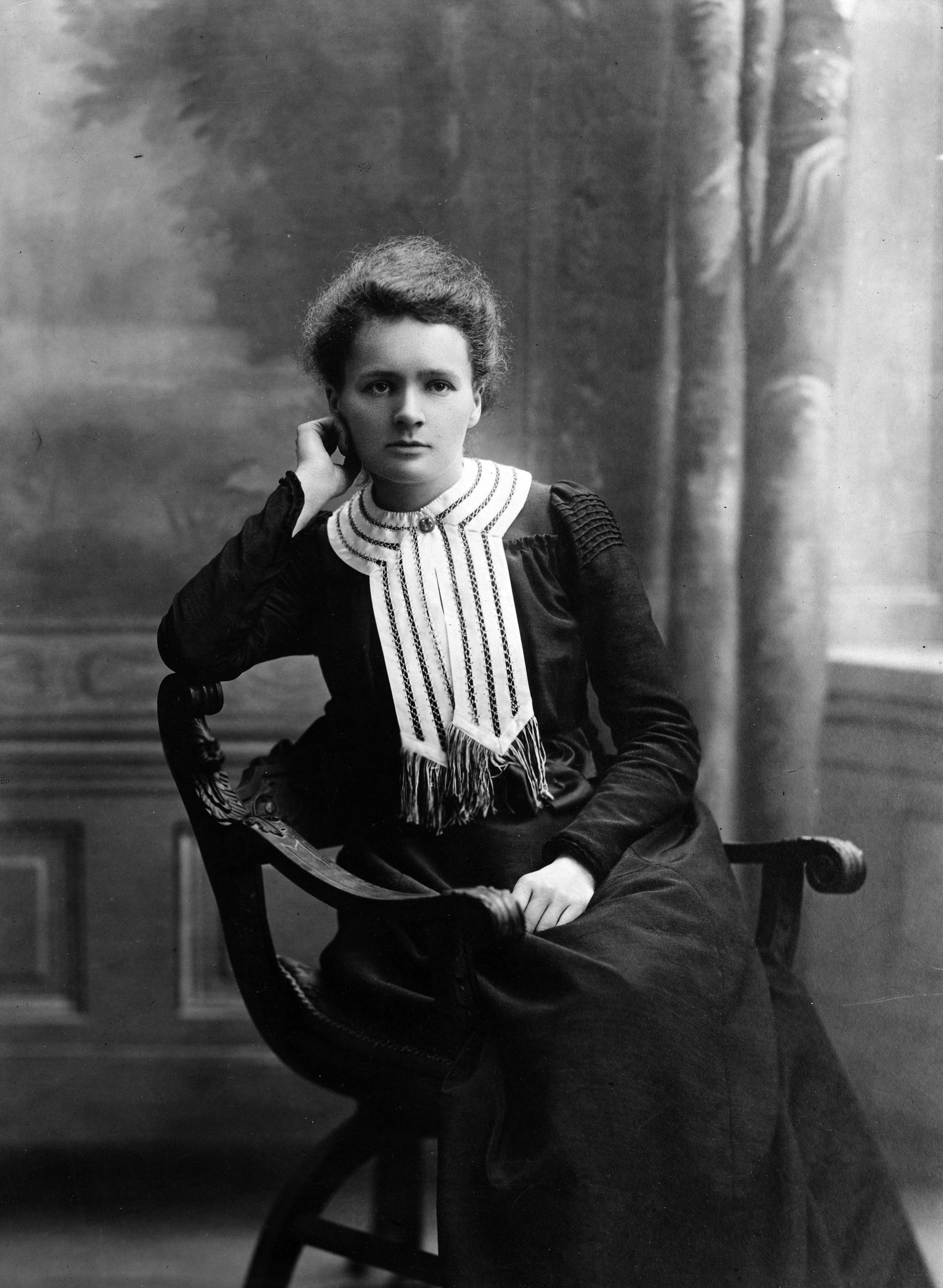 Maria Skłodowska-Curie w 1903 roku